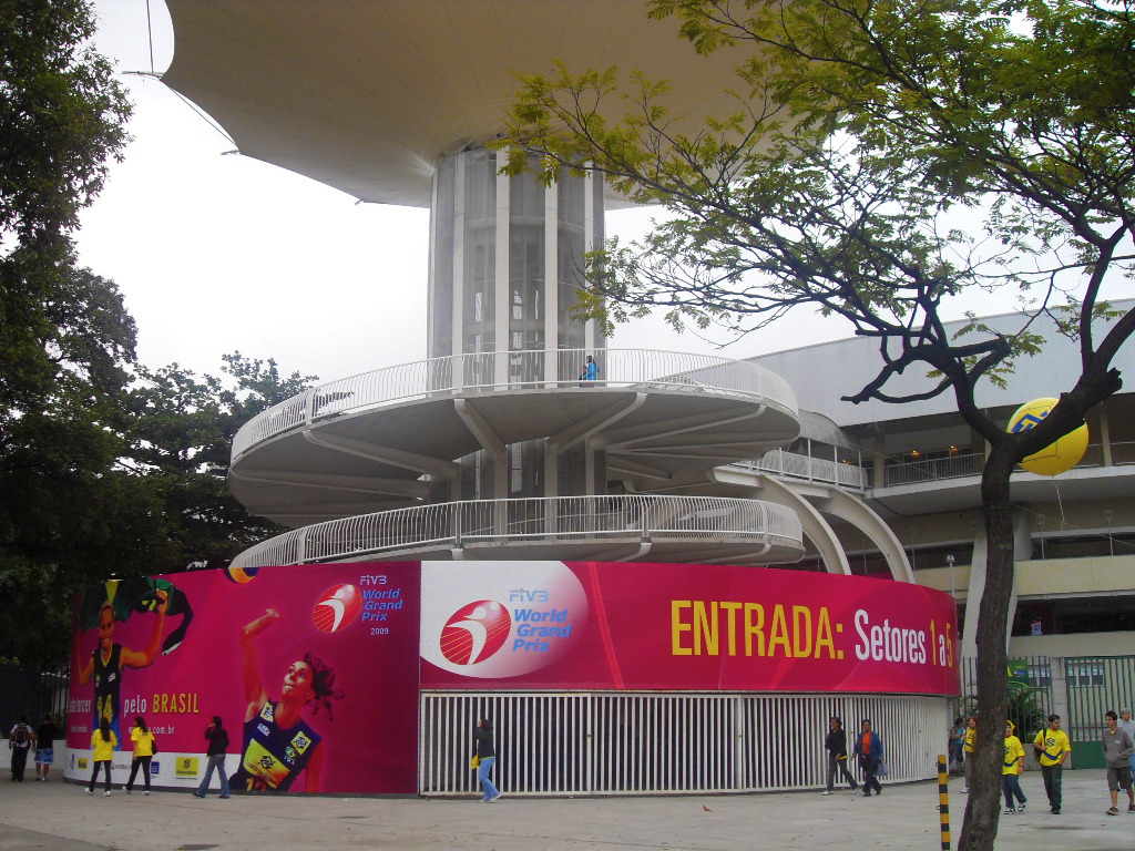 Maracanãzinho no primeiro dia de Grand Prix 2009